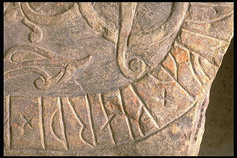 Öl25339:17 Köpingsvik. Inskriften lyder:.-ulf gjorde minnesmärket .. Motiv: Öl Köpingsvik kyrka (flera objekt) Nyckelord: Runor Kategori: Runristning/runsten Öl25339:17 Köpingsvik. Inskriften lyder:.-ulf gjorde minnesmärket.